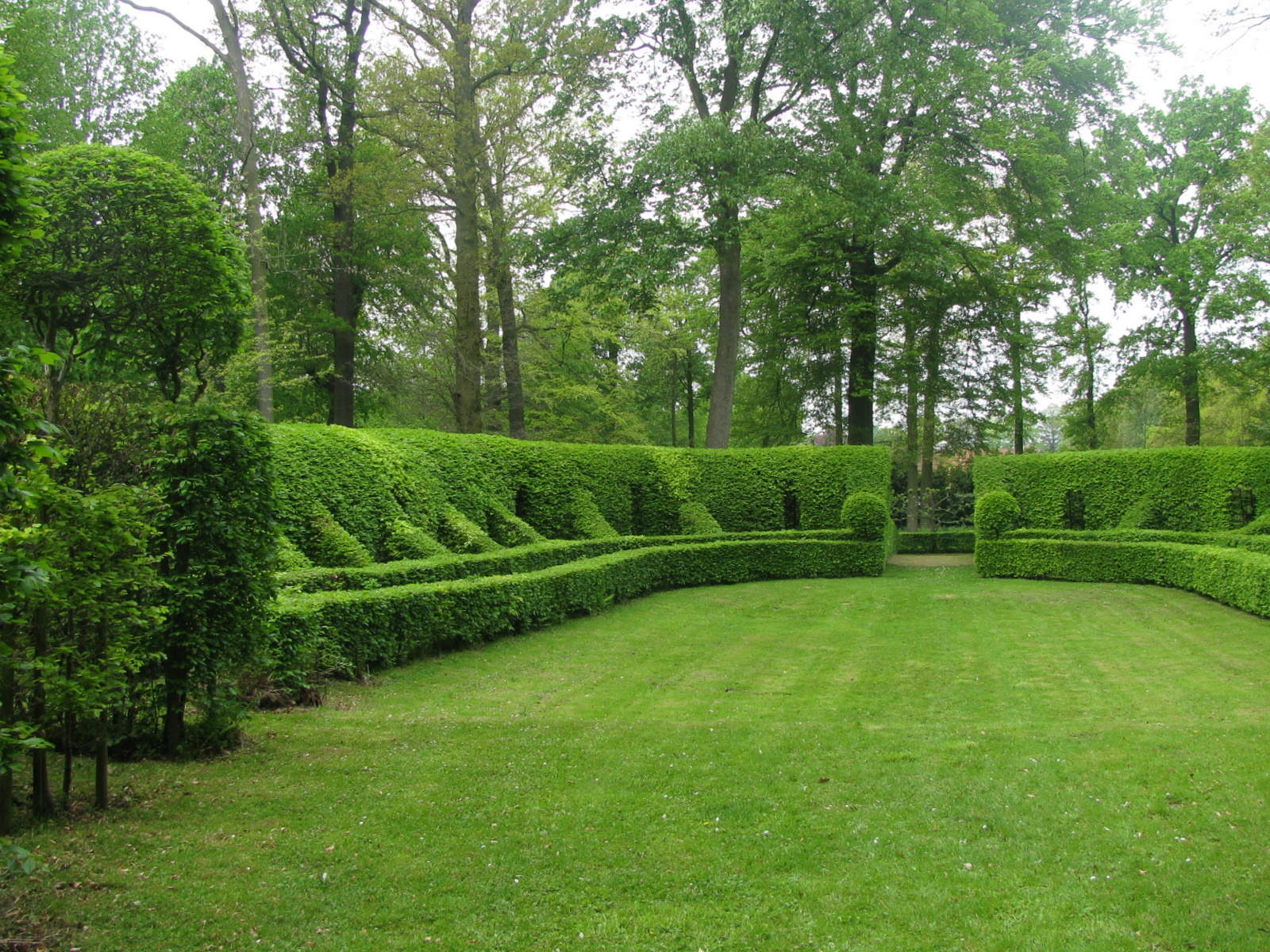 Leeuwergem castle